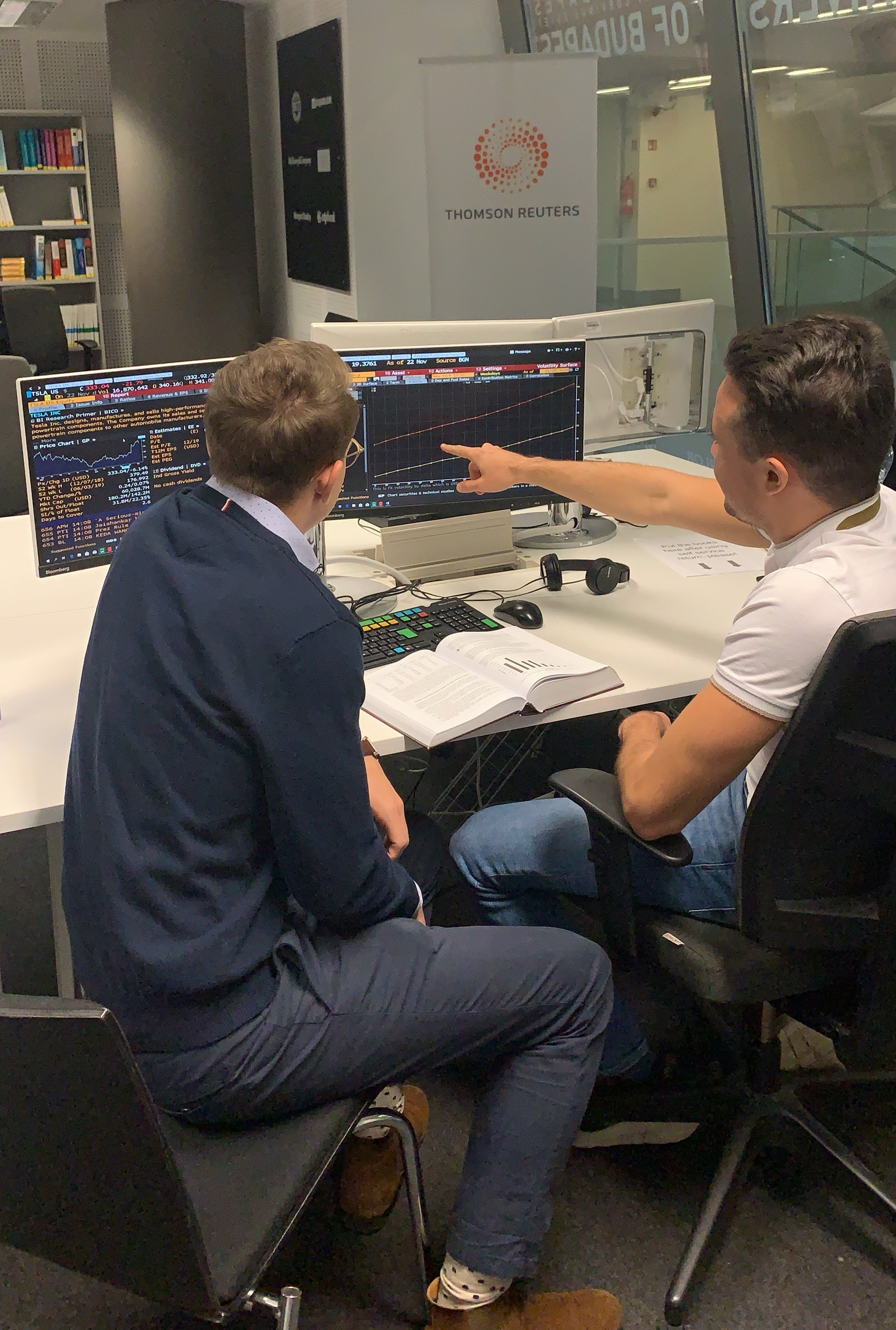 Bloomberg tréningen